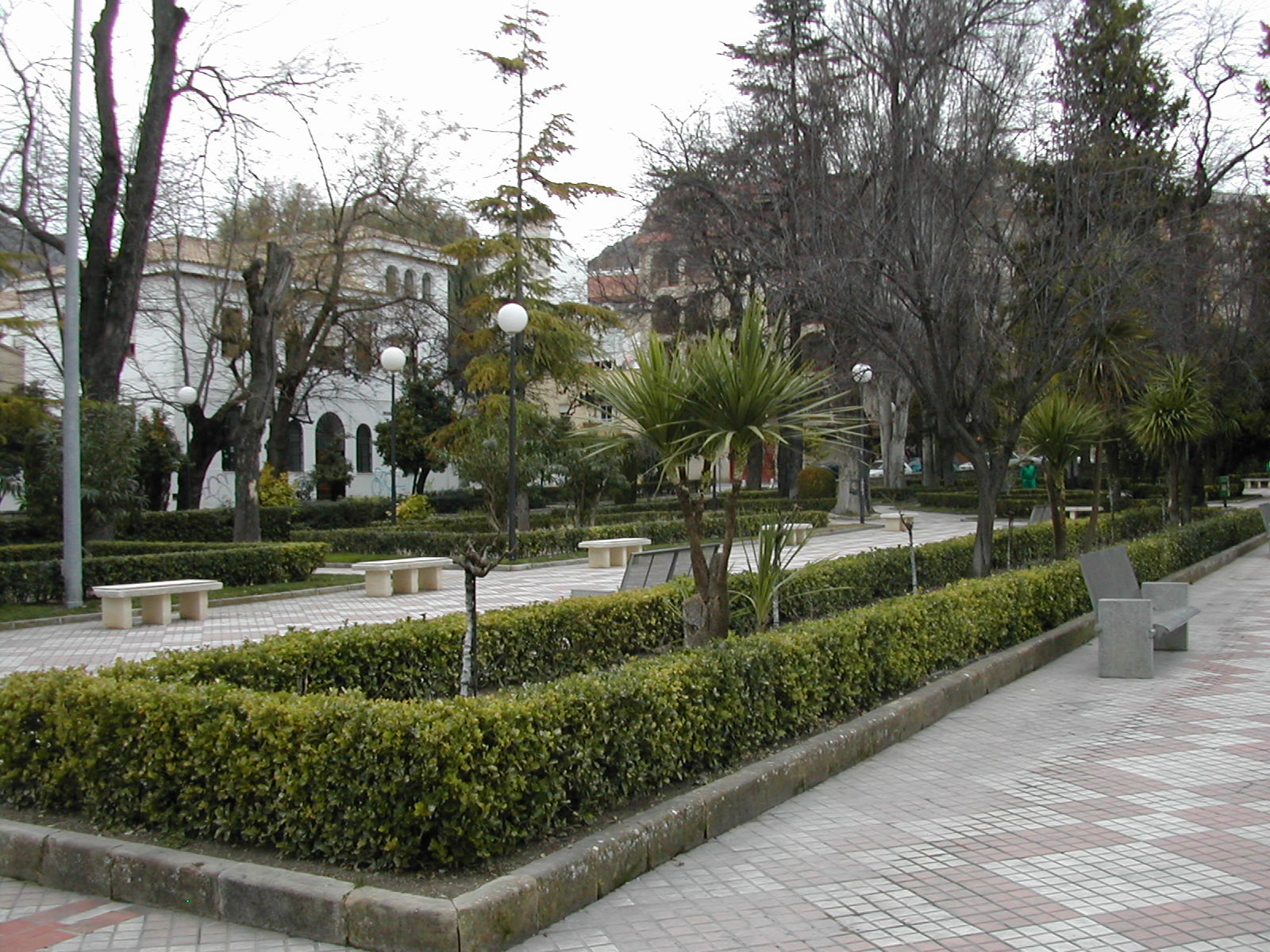 Alameda de Capuchinos de Jaén.